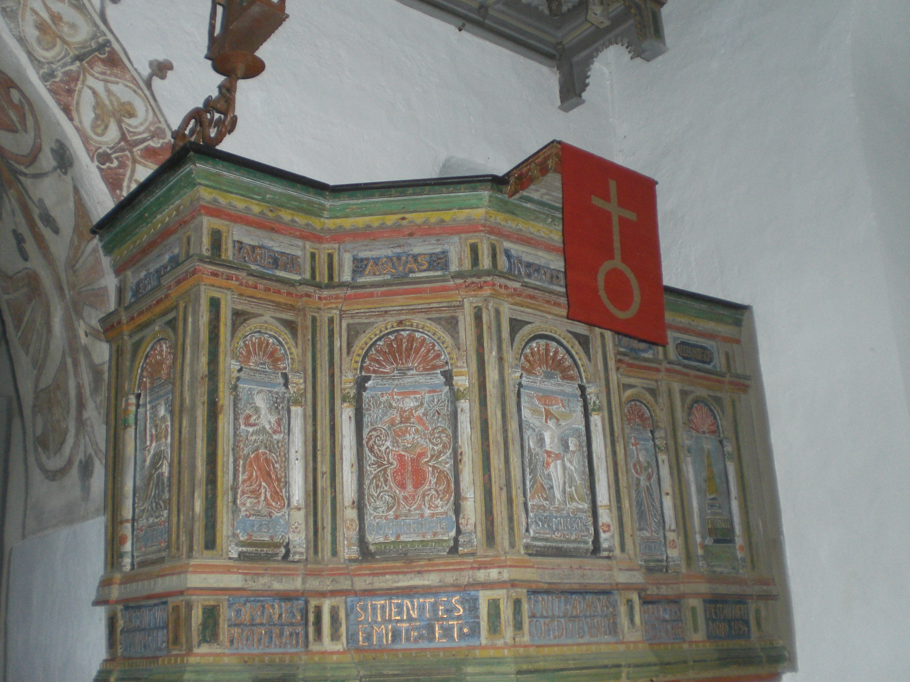 Rodenäs, Kirche, Kanzel - Renaissance, Emporenkanzel um 1580/1590 - vermutlich aus Rickelsbüller Kirche